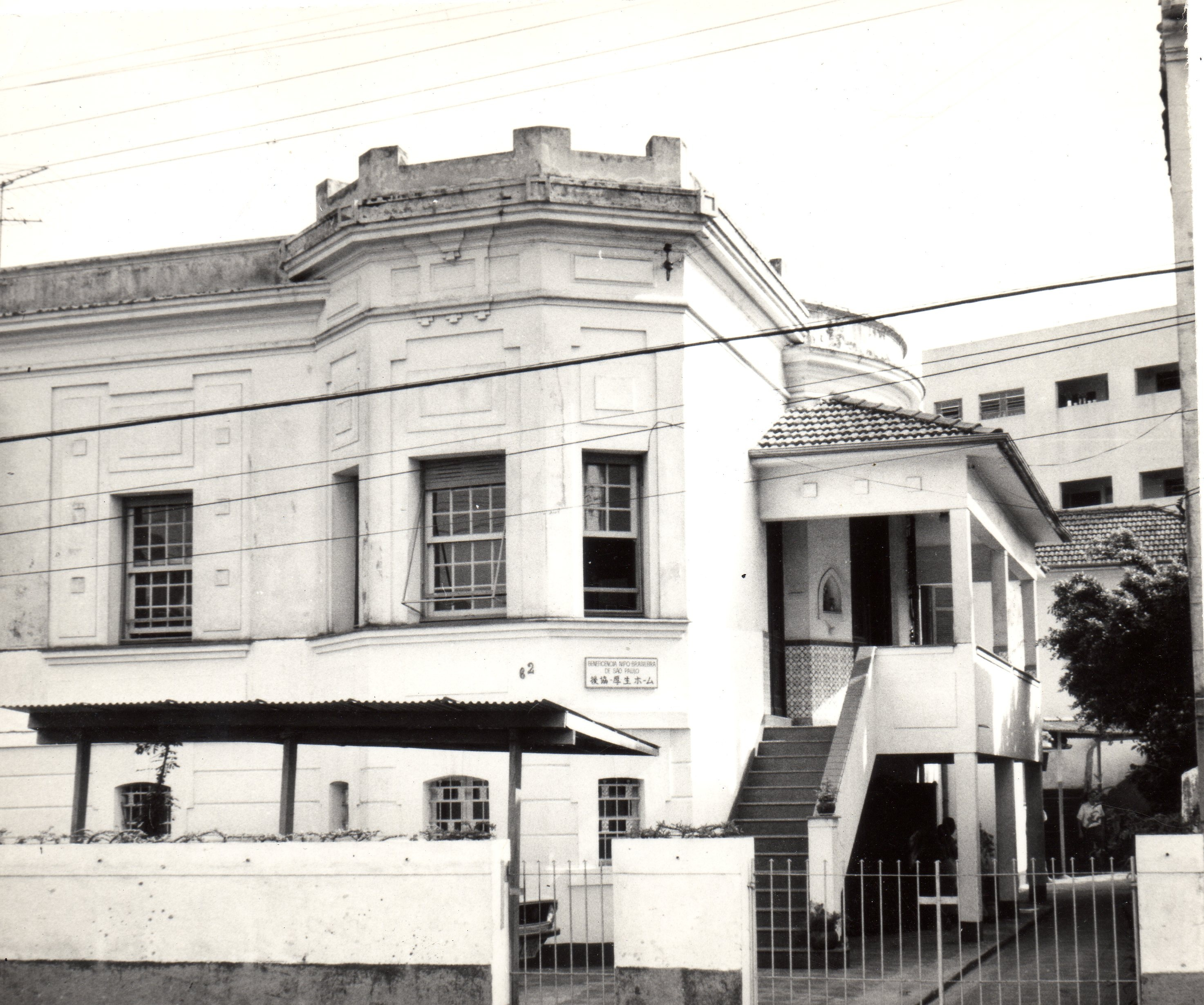 Casarão aonde funcionava a "Casa do Imigrante". Localizada em Santos.